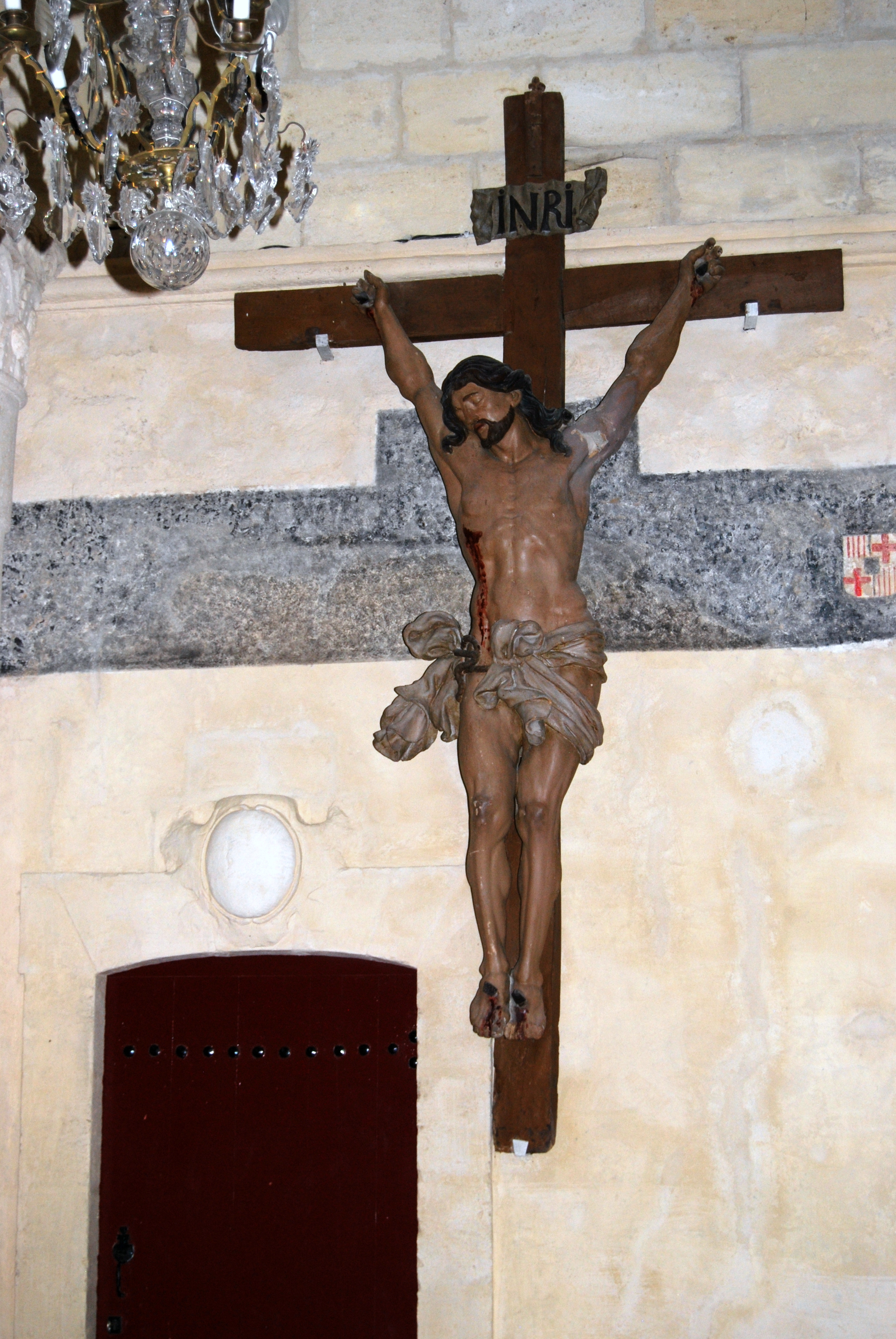 Église Sainte-Eulalie de Lignan-de-Bordeaux